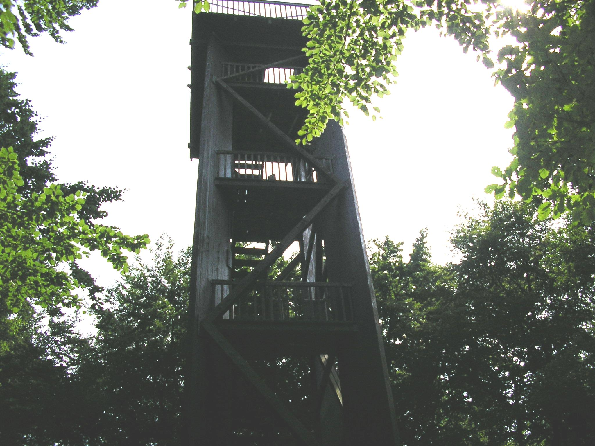 Wiehenturm im Wiehengebirge bei Preußisch Oldendorf